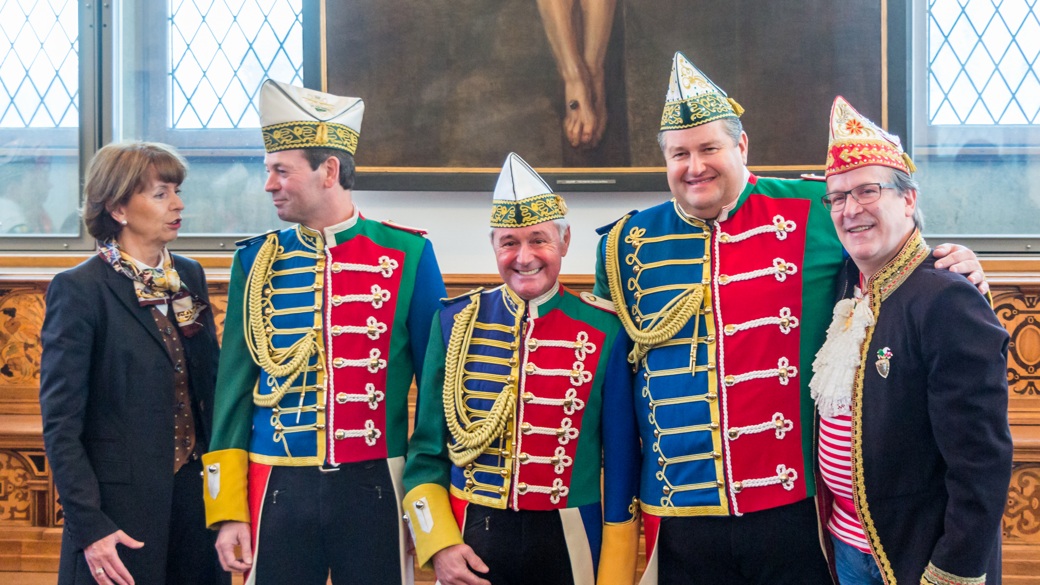 Vertragsunterzeichnung Sessionsvertrag und Rathausempfang 2019